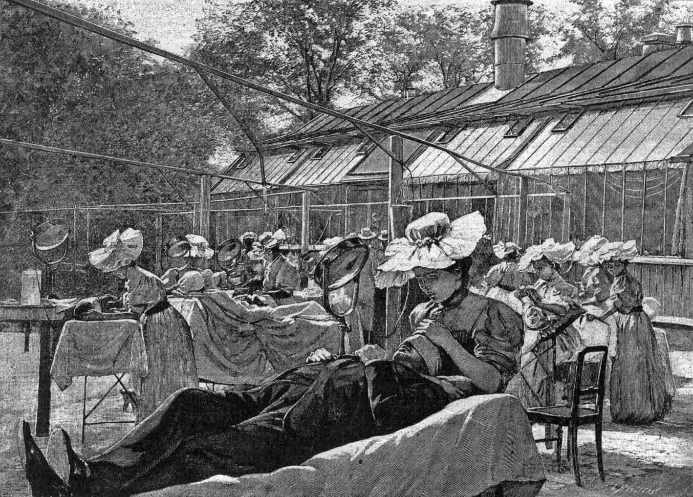 Лечение солнечным светом в институте проф. Финзена в Копенгагене. 1901 год